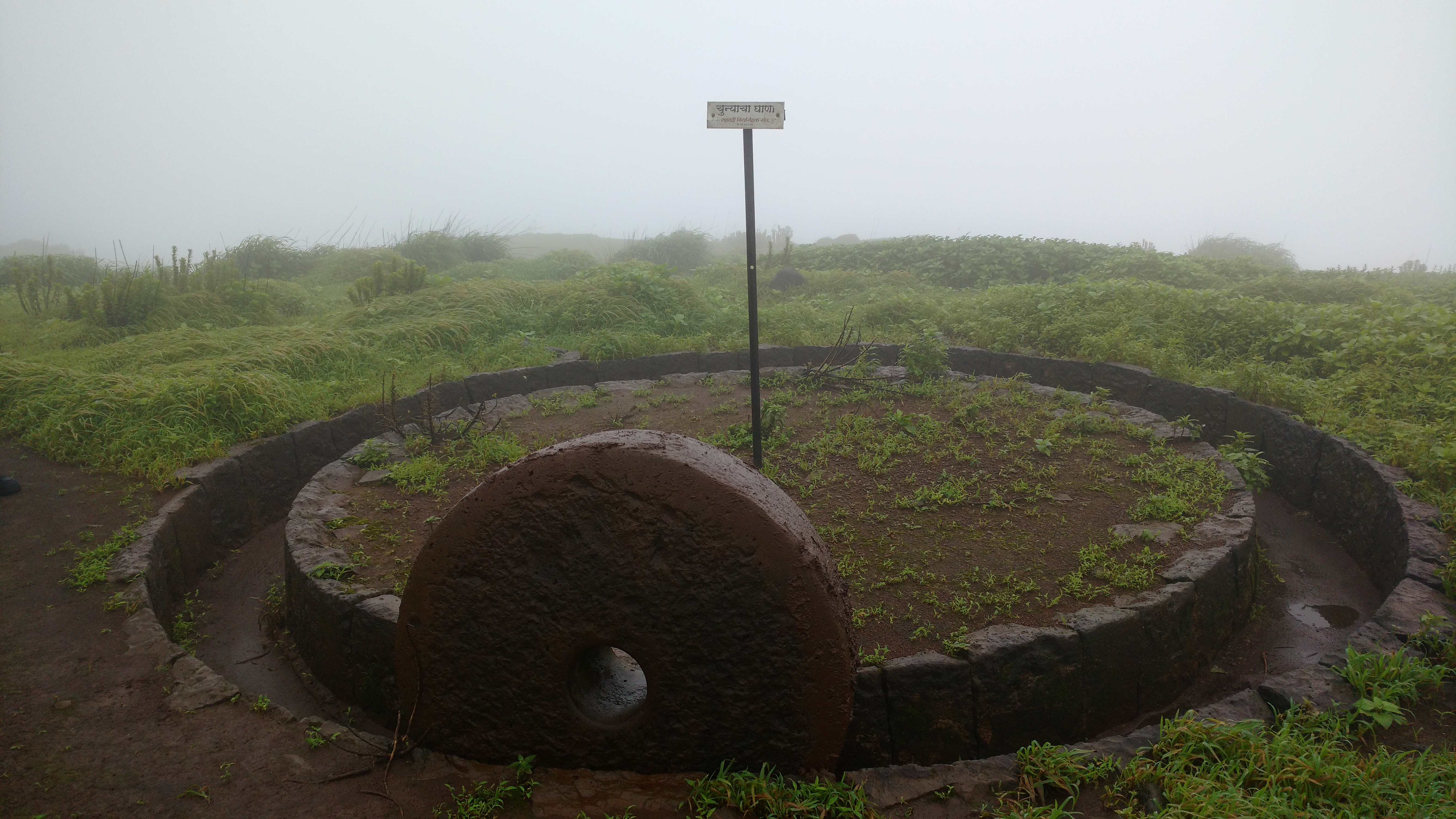 Lime mixer ; Kenjalgad Fort